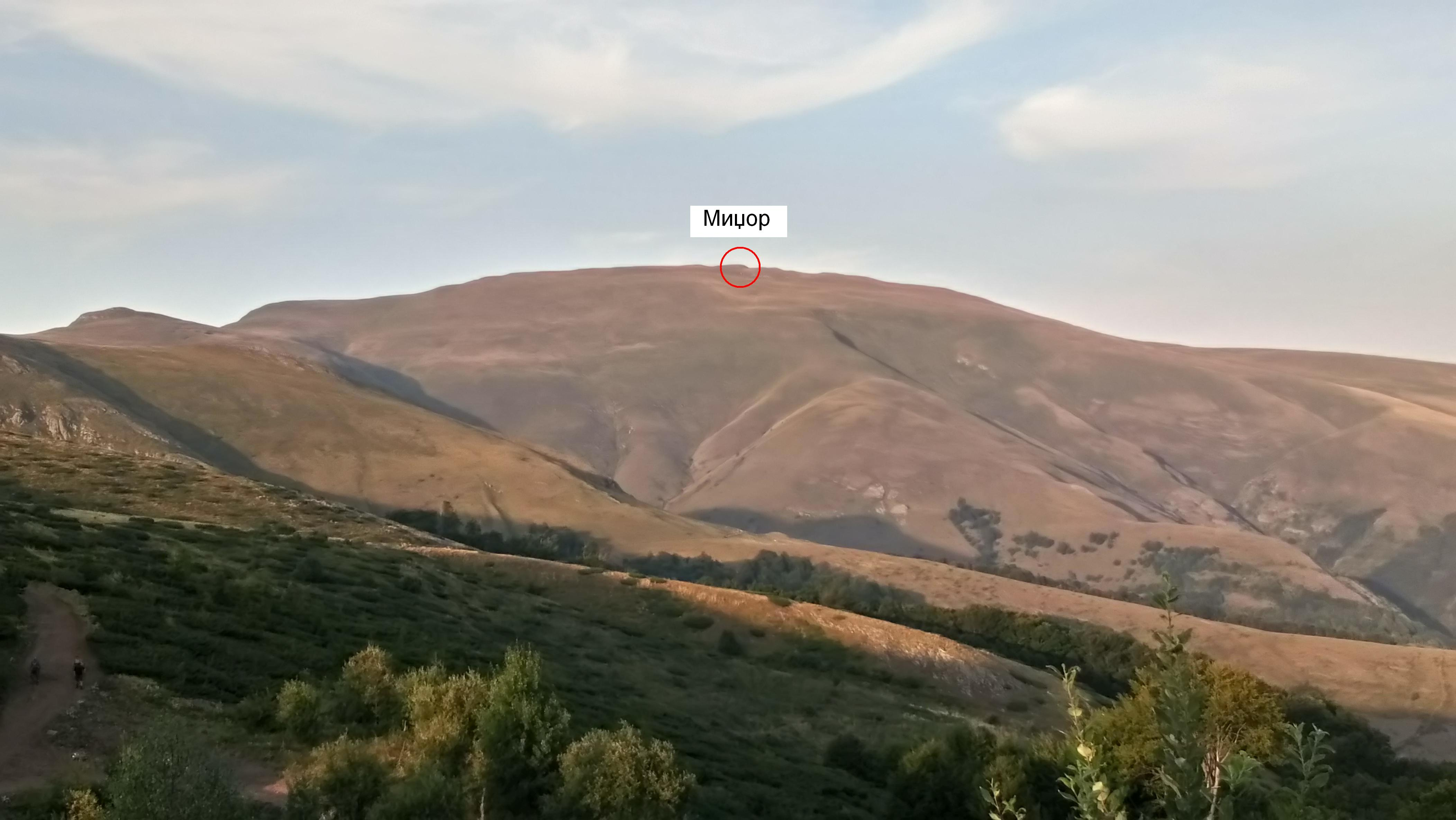 Тачна позиција врха, наглашена црвеним кругом. Фотографија и интервенције на фотографији су моје ауторско дјело.